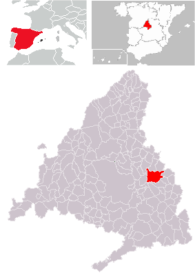 Triple mapa amb la localització de Alcalá de Henares, Madrid i Espanya